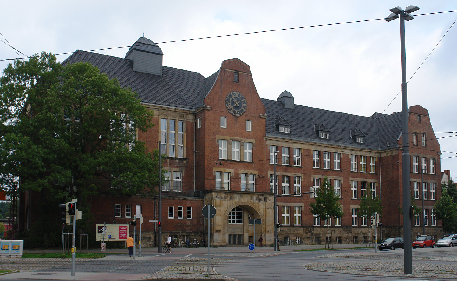 Bremen: Integrierte Stadtteilschule am Leibnizplatz Das abgebildete Objekt ist ein geschütztes Kulturdenkmal in der Freien Hansestadt Bremen, mit der Nr. 1116 beim Landesamt für Denkmalpflege registriert.